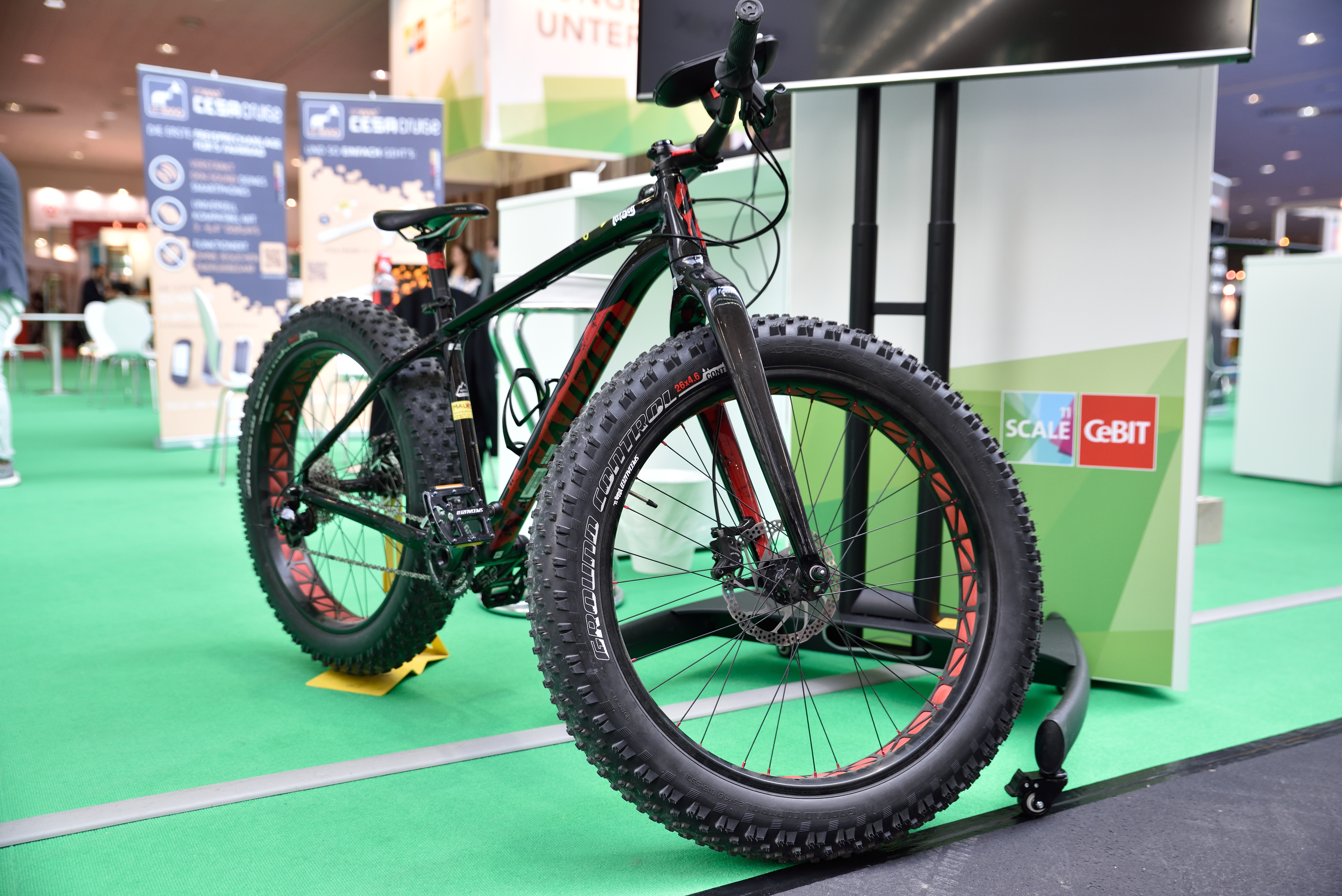 Specialized Fatboy Expert auf der CeBIT 2016 in Hannover